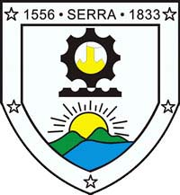 Brasão da cidade de Serra / ES: Ainda durante o concurso "Bandeira do Município" em 1975, o prefeito Aldari Nunes lançou também o concurso para escolher o brasão do município, sendo vencedor o jovem MARINALDO FRAGA CASTELO que recebeu como prêmio a quantia de CR$ 500,00 (quinhentos cruzeiros).